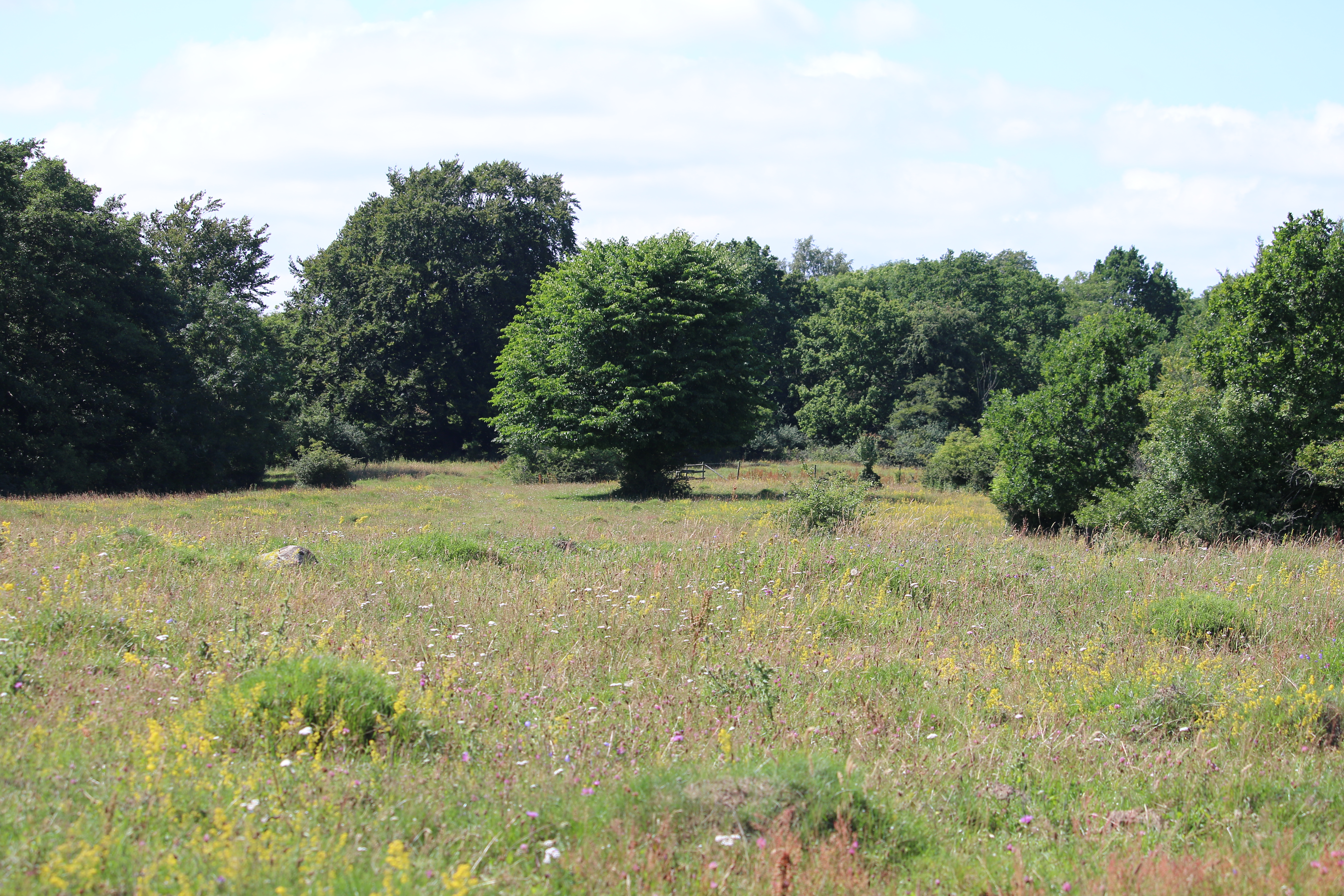 Skoghejdan juli 2016